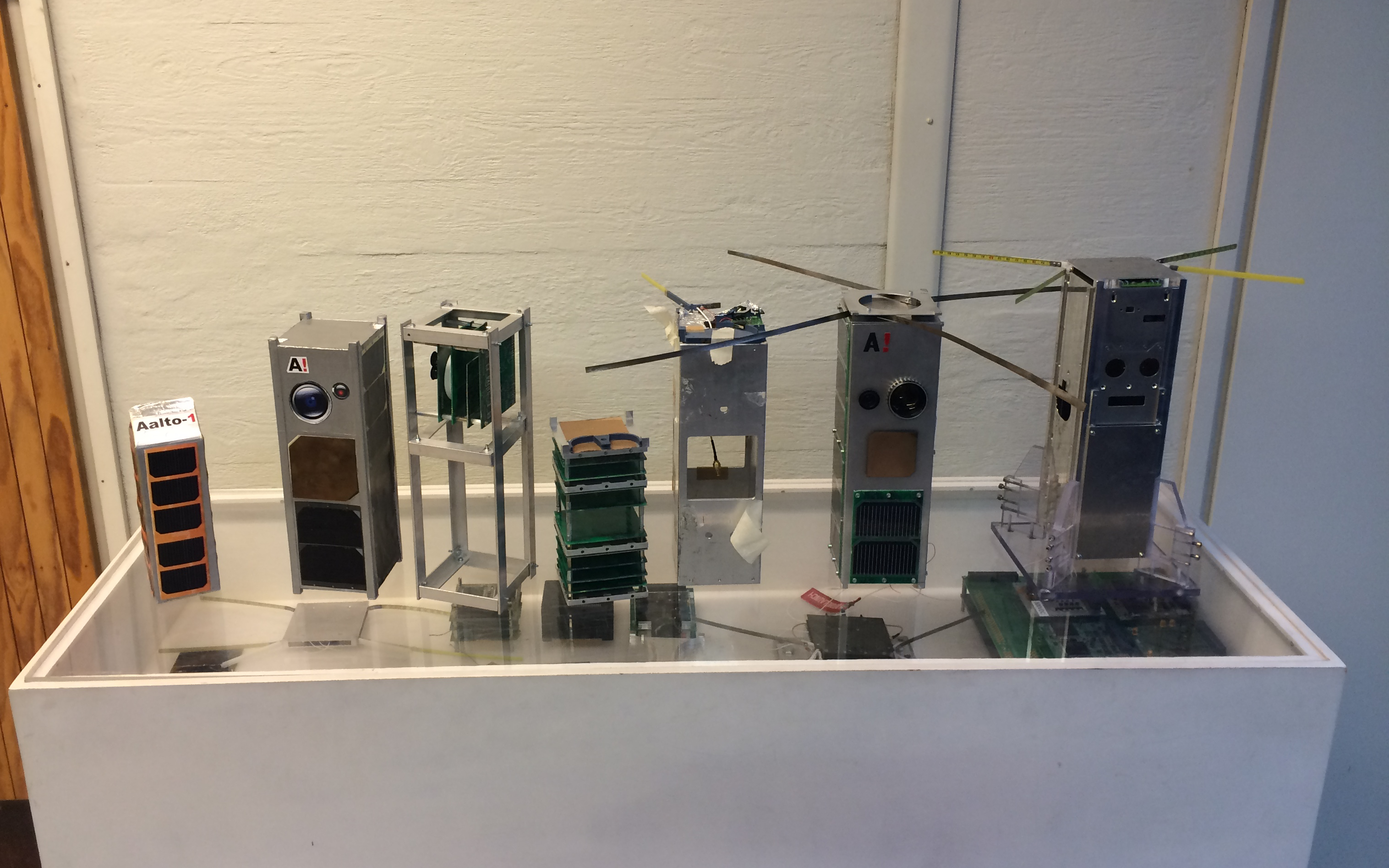 Erilaisia mallikappaleita alkaen vasemmalla olevasta ensimmäisestä pahvisesta hahmotelmasta.